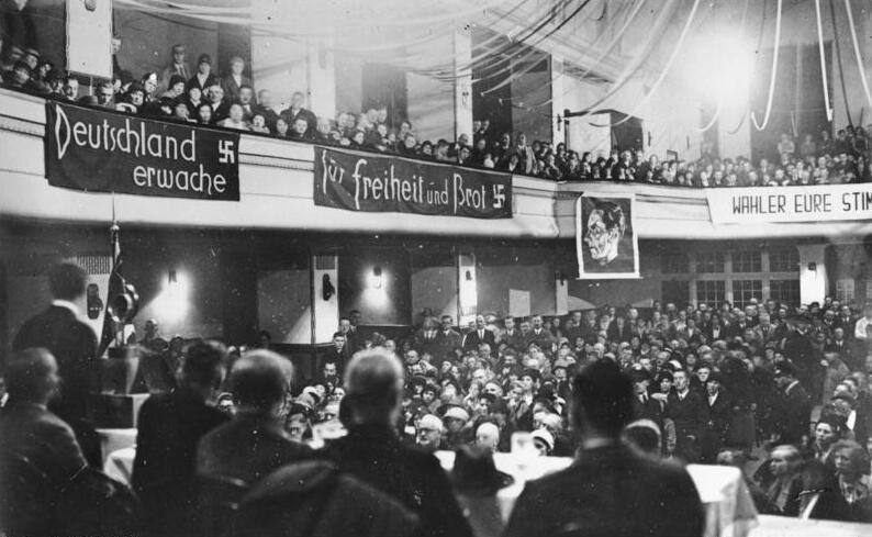 Berlin-Zehlendorf, Rede Joseph Goebbels Goebbels spricht in einer Versammlung in den Hindenburg-Festsälen in Berlin-Zehlendorf zur zweiten Reichspräsidentenwahl. 7.4.1932 [Berlin-Zehlendorf, Hindenburg-Festsäle.- Rede von Joseph Goebbels anläßlich der zweiten Reichspräsidentenwahlen. Halleninnenraum mit Plakaten "Deutschland erwache", "Für Freiheit und Brot", "Wähler Eure Stimme"]